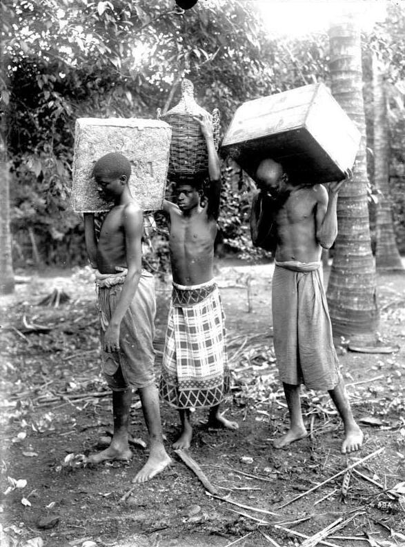 Träger